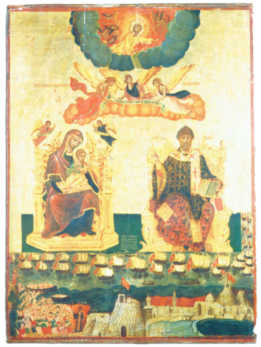 Icona bizantina; Il miracolo di Corfù; aurore ignoto, seconda metà-fine XVIII secolo. Nella notte del 18 agosto del 1716, gli ottomani attaccarono l'isola ma, dopo sei ore, la lotta era ancora incerta e nessuno riusciva ad avere il sopravvento. La notte successiva i Veneziani ottennero un aiuto imprevisto dal cielo: un violento nubifragio devastò il campo ottomano e molte navi, rotti gli ormeggi, si fracassarono le une contro le altre. All'alba gli ottomani decisero di togliere il campo e di abbandonare quell'isola.